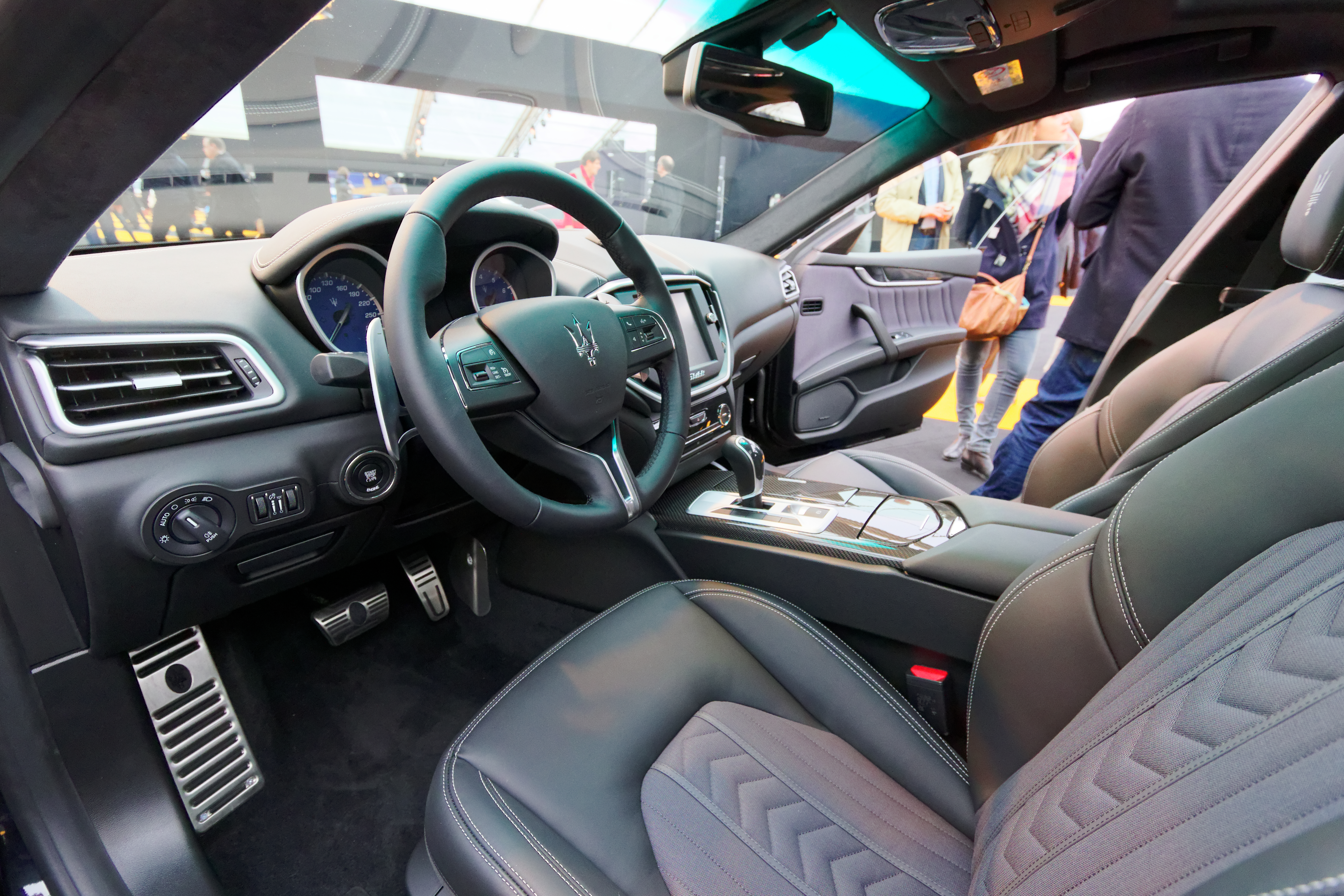 La Maserati Ghibli Ermenegildo Zegna Edition exposée lors du festival automobile international 2016.